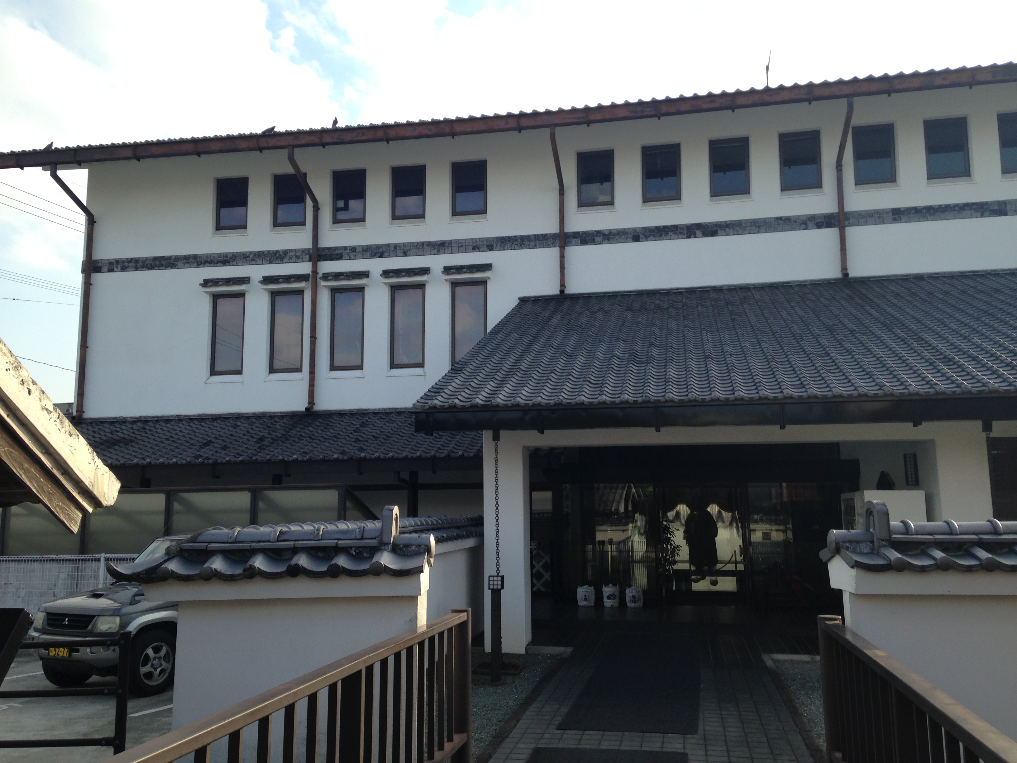 北原白秋記念館・柳川市立歴史民俗資料館